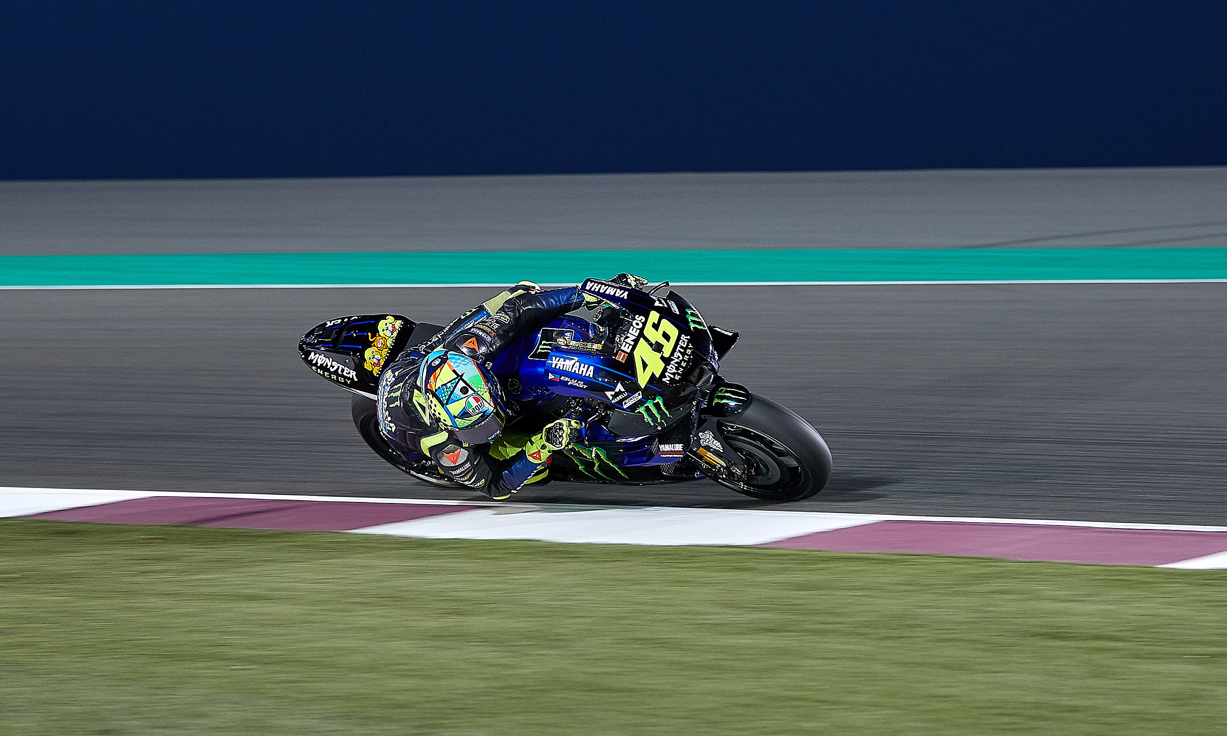 Пилот заводской команды Yamaha MotoGP Валентино Росси на зимних тестах 2020 сезона в Катаре